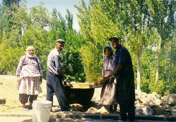 kişisel resim